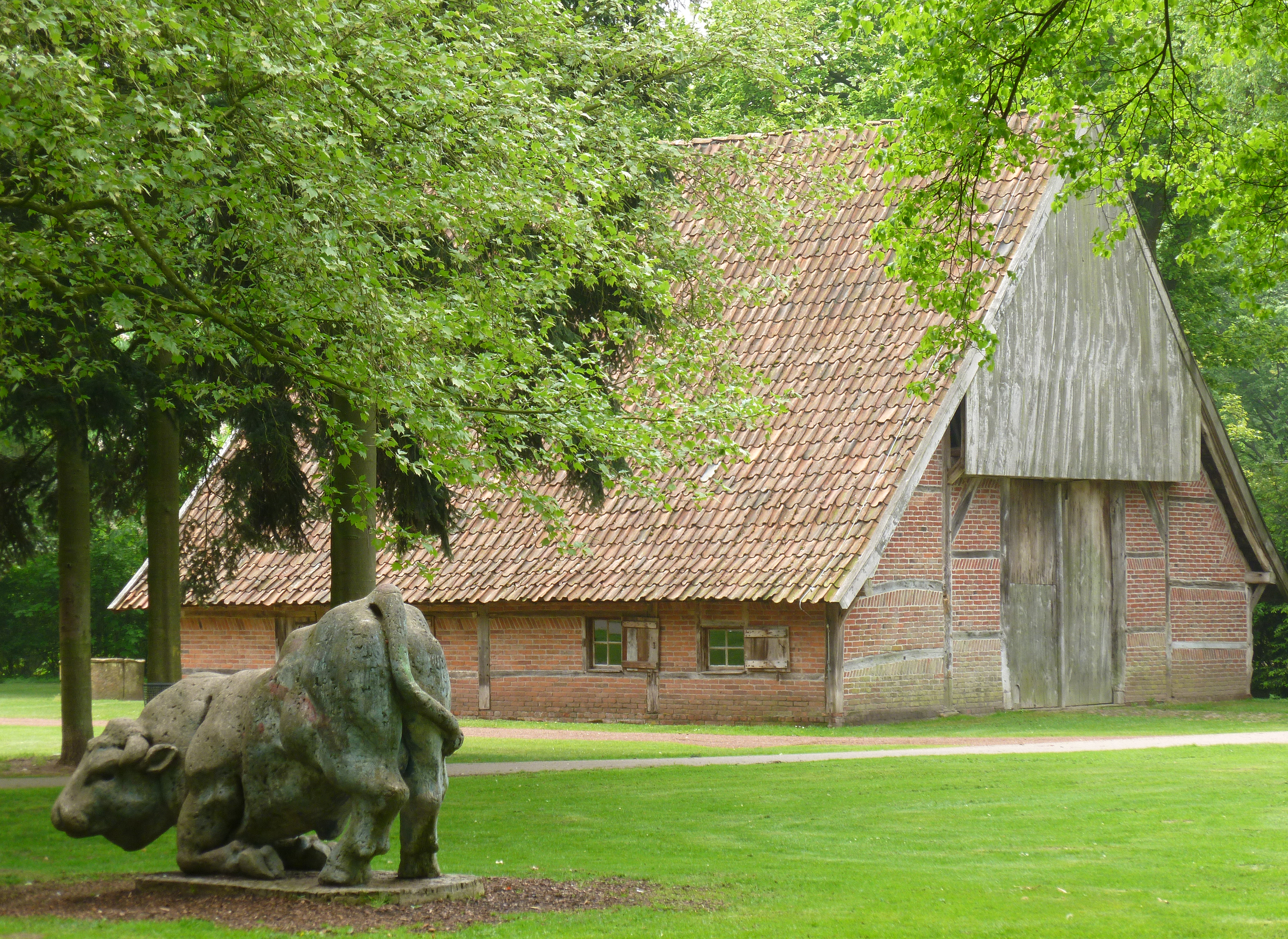 Heuerlingshaus, ehemals aus Südlohn, im Bauernhausmuseum in Vreden, Butenwall 11 This is a photograph of an architectural monument.